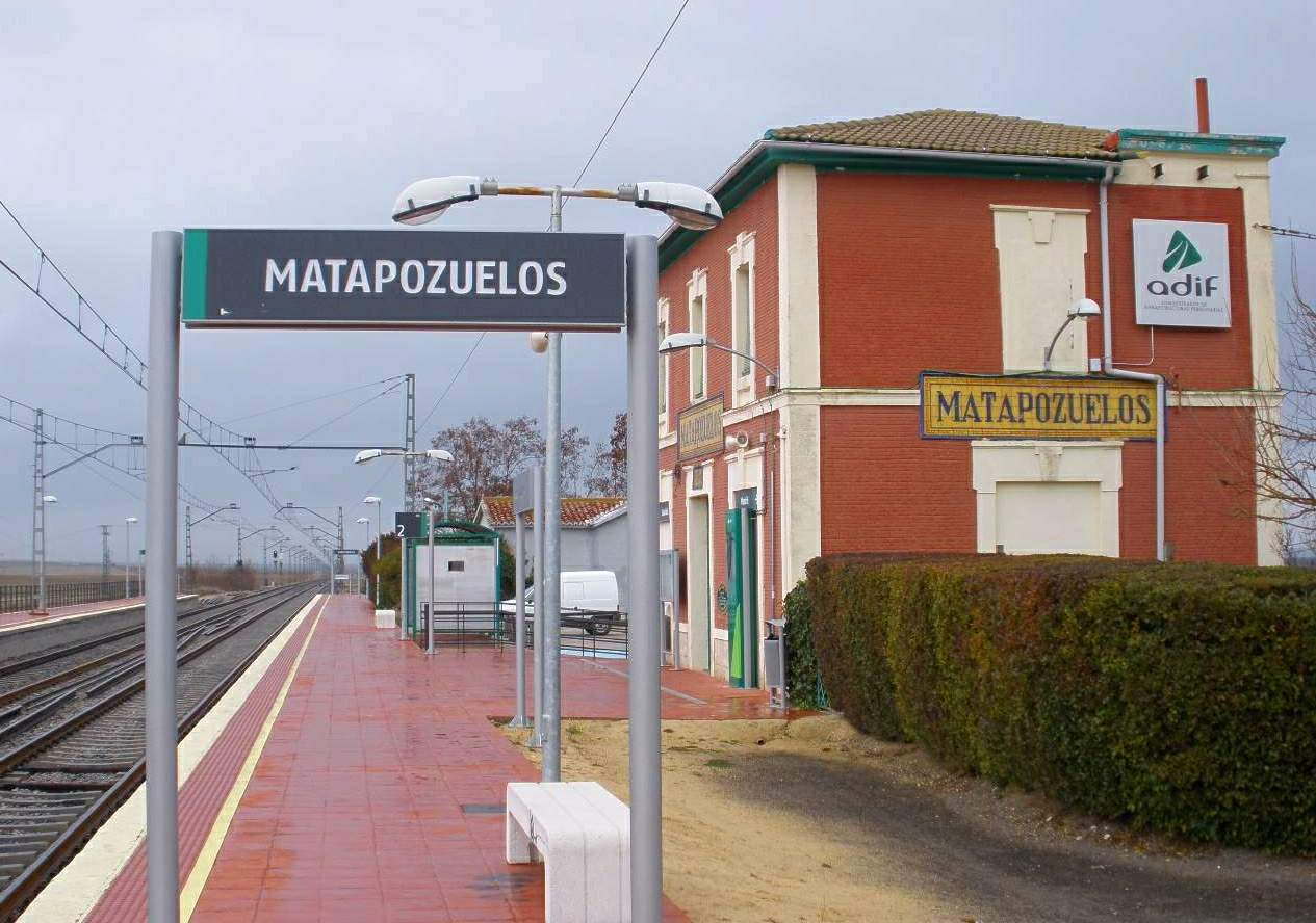 Estación de tren de Matapozuelos (provincia de Valladolid).